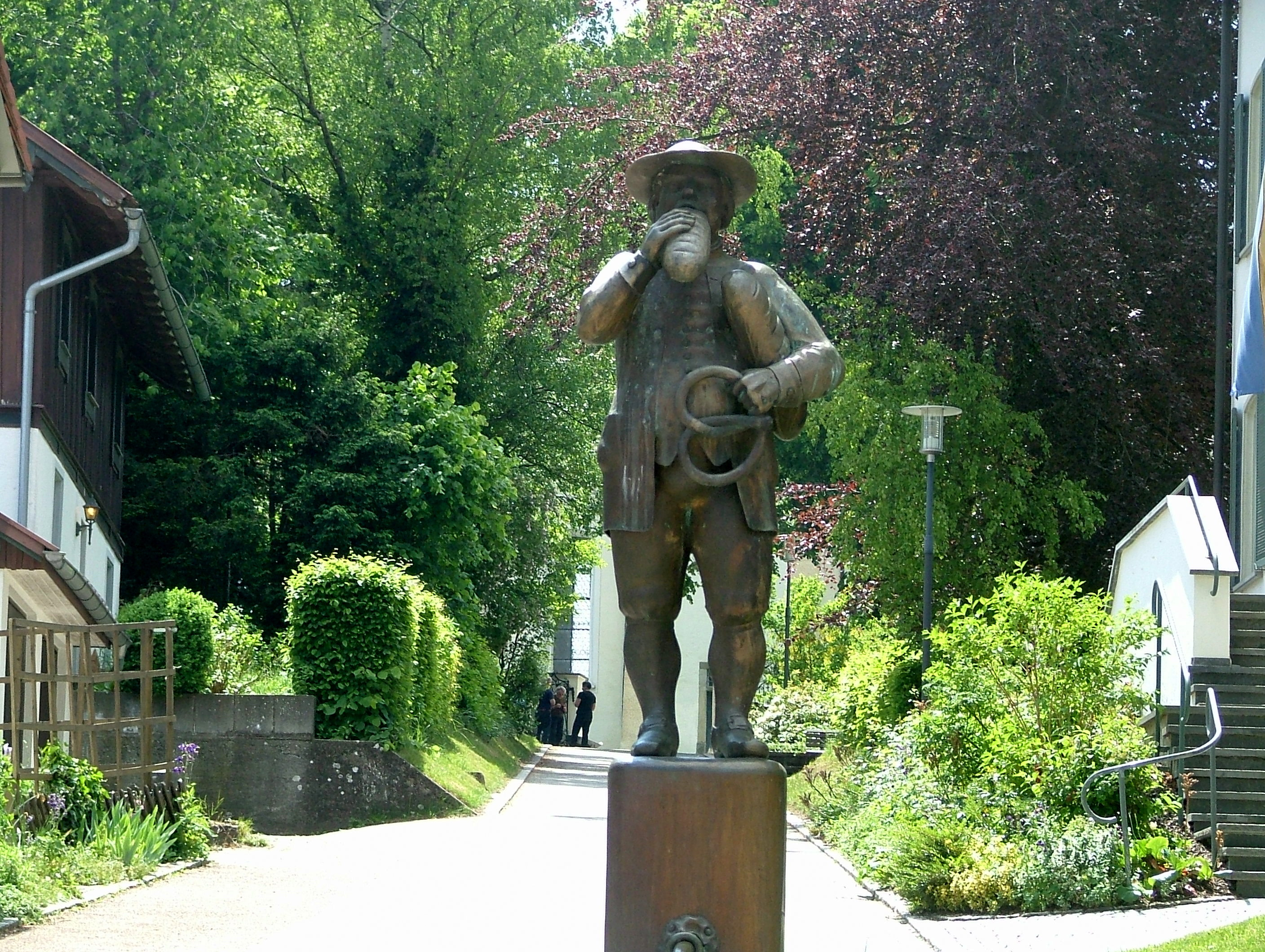 Der Brotesser